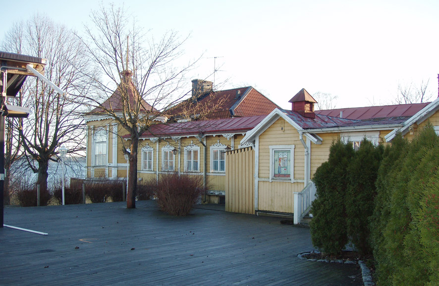 Lidingöbro värdshus, Kaknäs, Djurgården, Stockholm, Sweden.